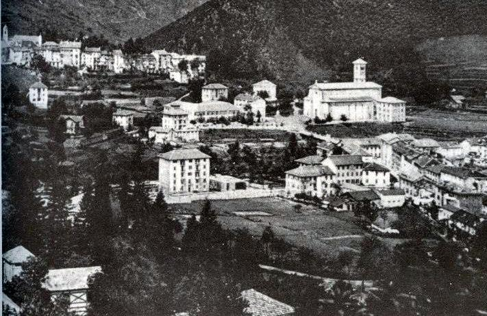 Panorama del 1930 di Masone, Liguria, Italia